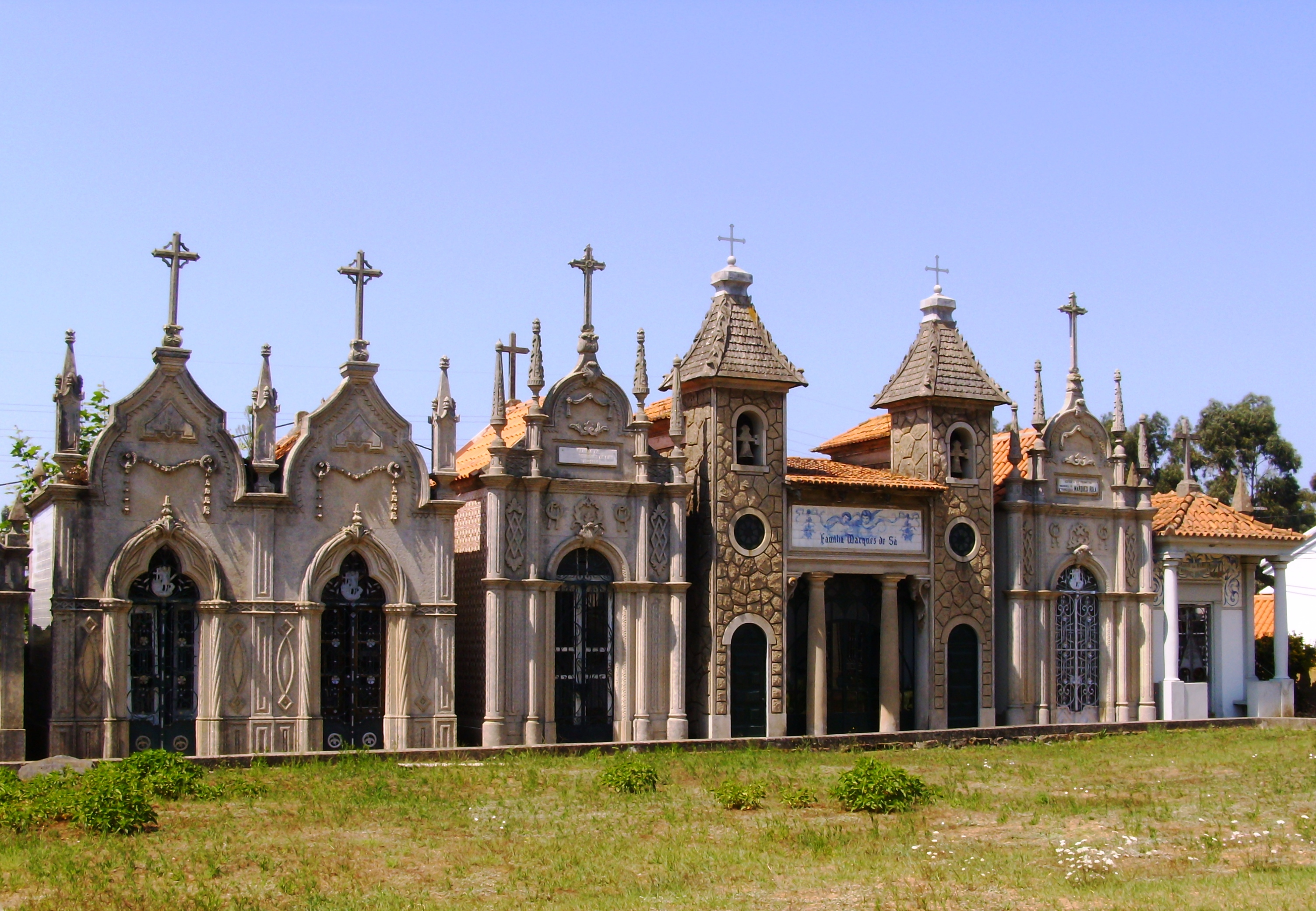 Jazigos no antigo cemitério, Cortegaça, concelho de Ovar, distrito de Aveiro, Portugal.